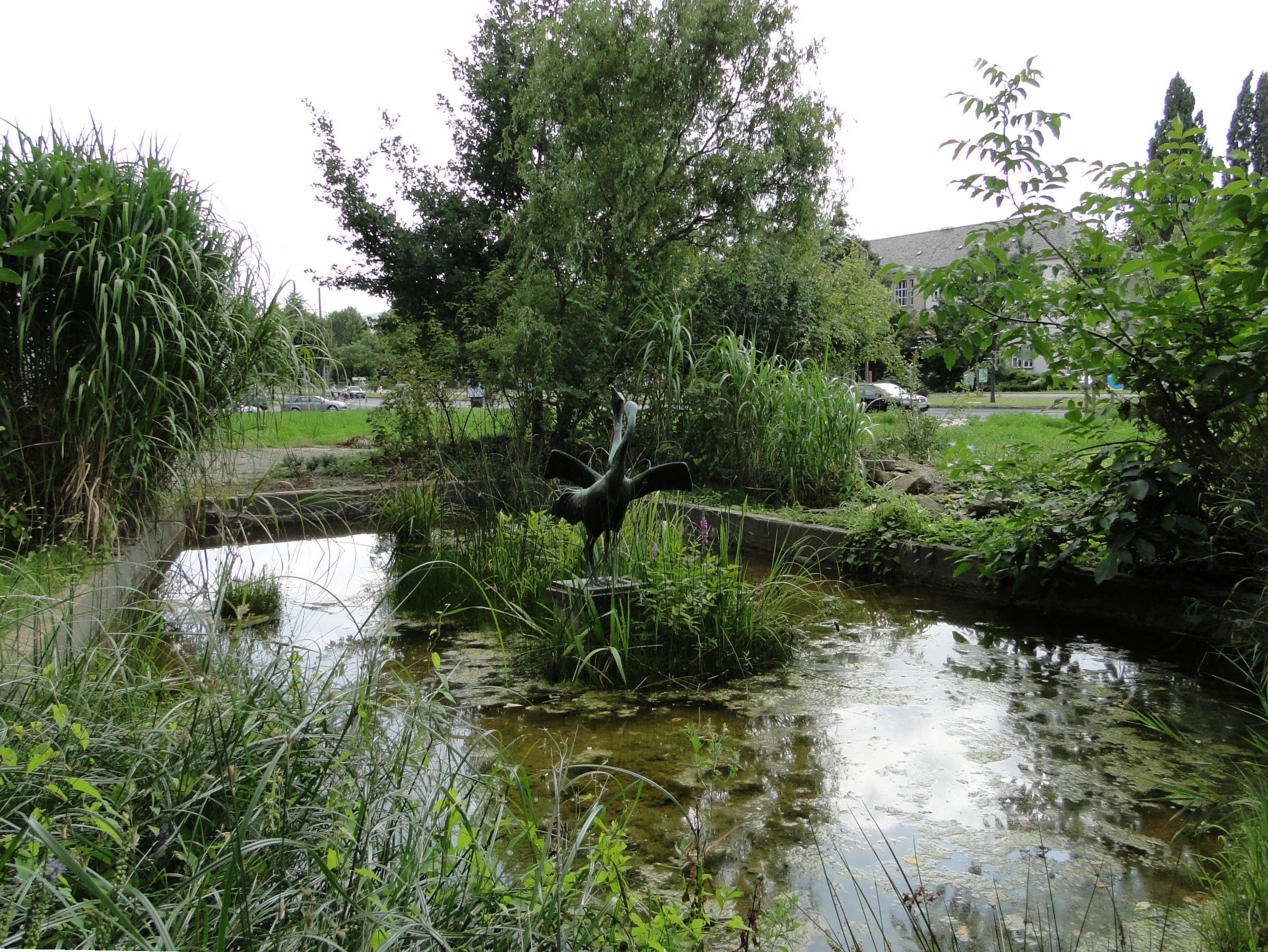 Kranichbrunnen von Werner Scheffel vor dem Andreas-Schubert-Bau der TU Dresden